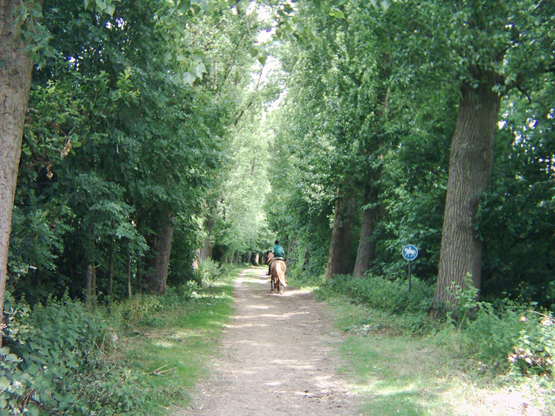 Auf dem Strategischen Bahndamm im Landkreis Neuss, Blickrichtung Nordwesten an Hülchrath vorbei. Die Straße L 142 schneidet abgesenkt im Rücken der Aufnahme den Bahndamm.